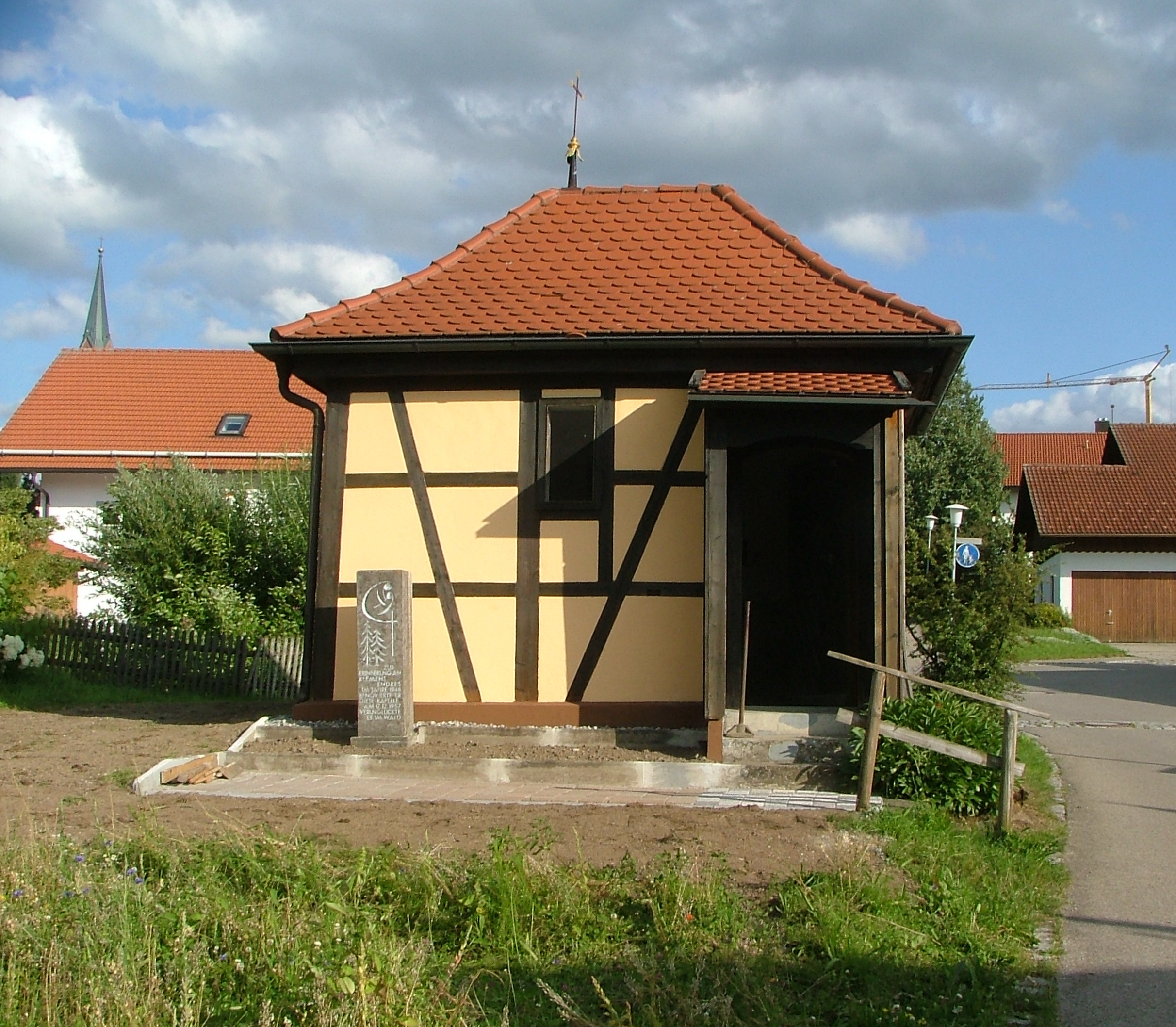 Pestkapelle